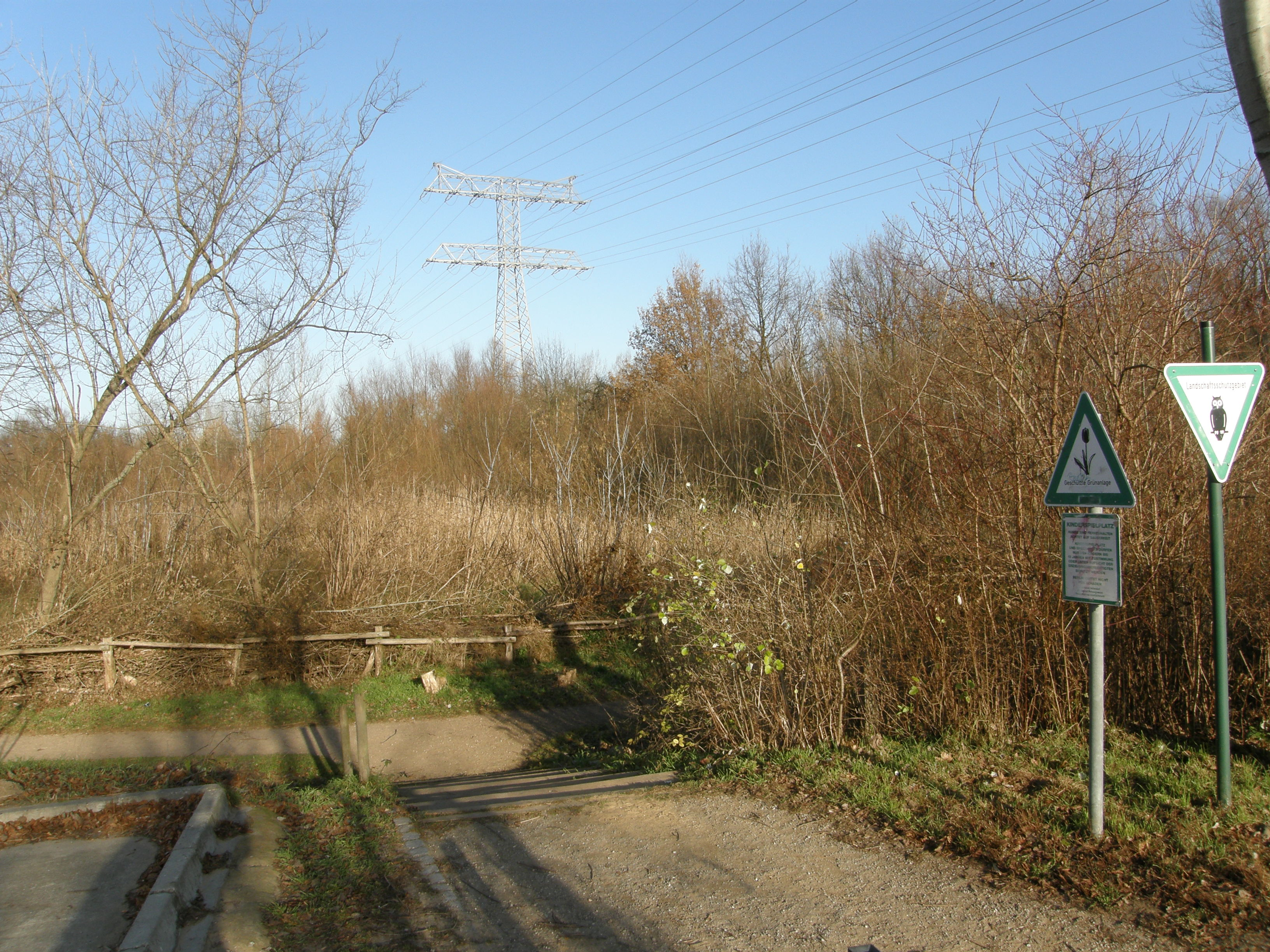 Berlin-Hellersdorf, Zerbster Str., Teil der Hönower Weiherkette, LSG